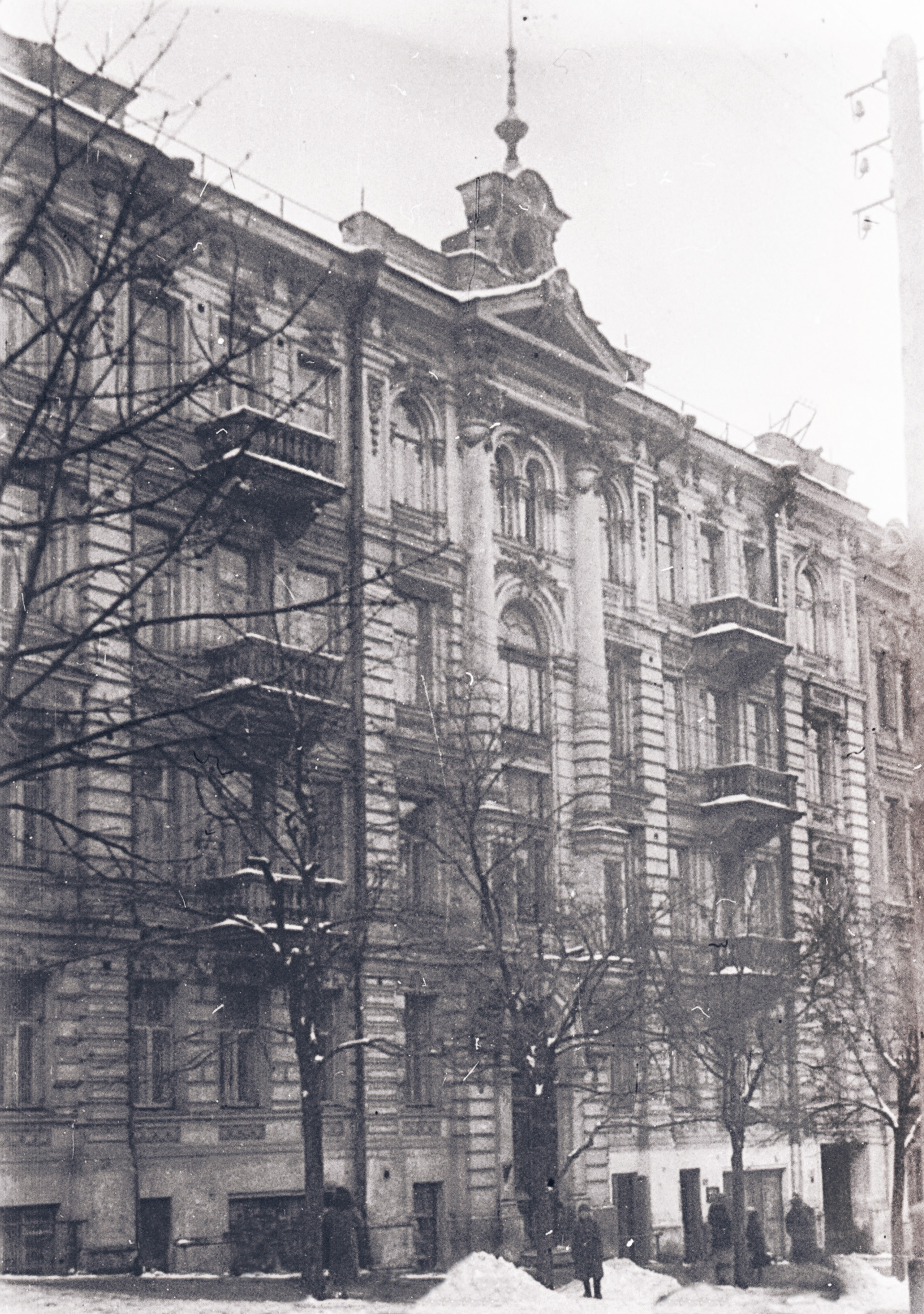 Будинок із левами, Київ, Пушкінська вулиця, 11